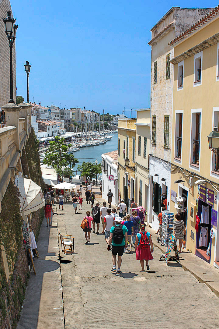 Bajando al puerto de Ciutadella de Menorca